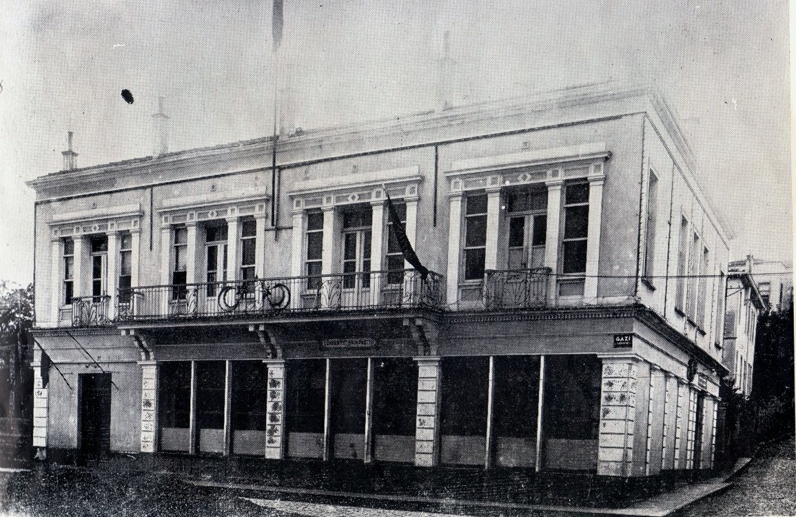 Günümüzdeki Gazi Müzesi.